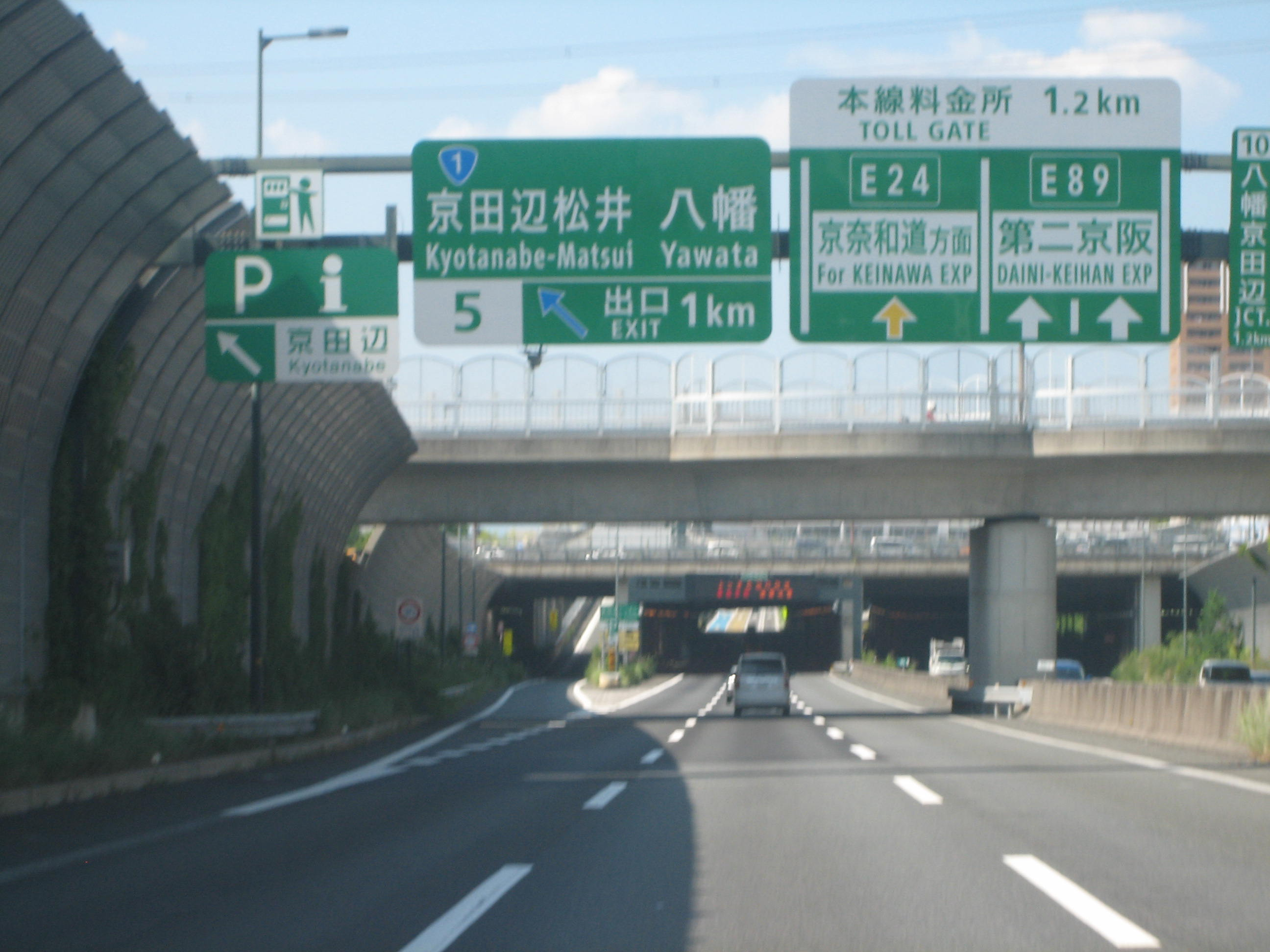 京田辺PA